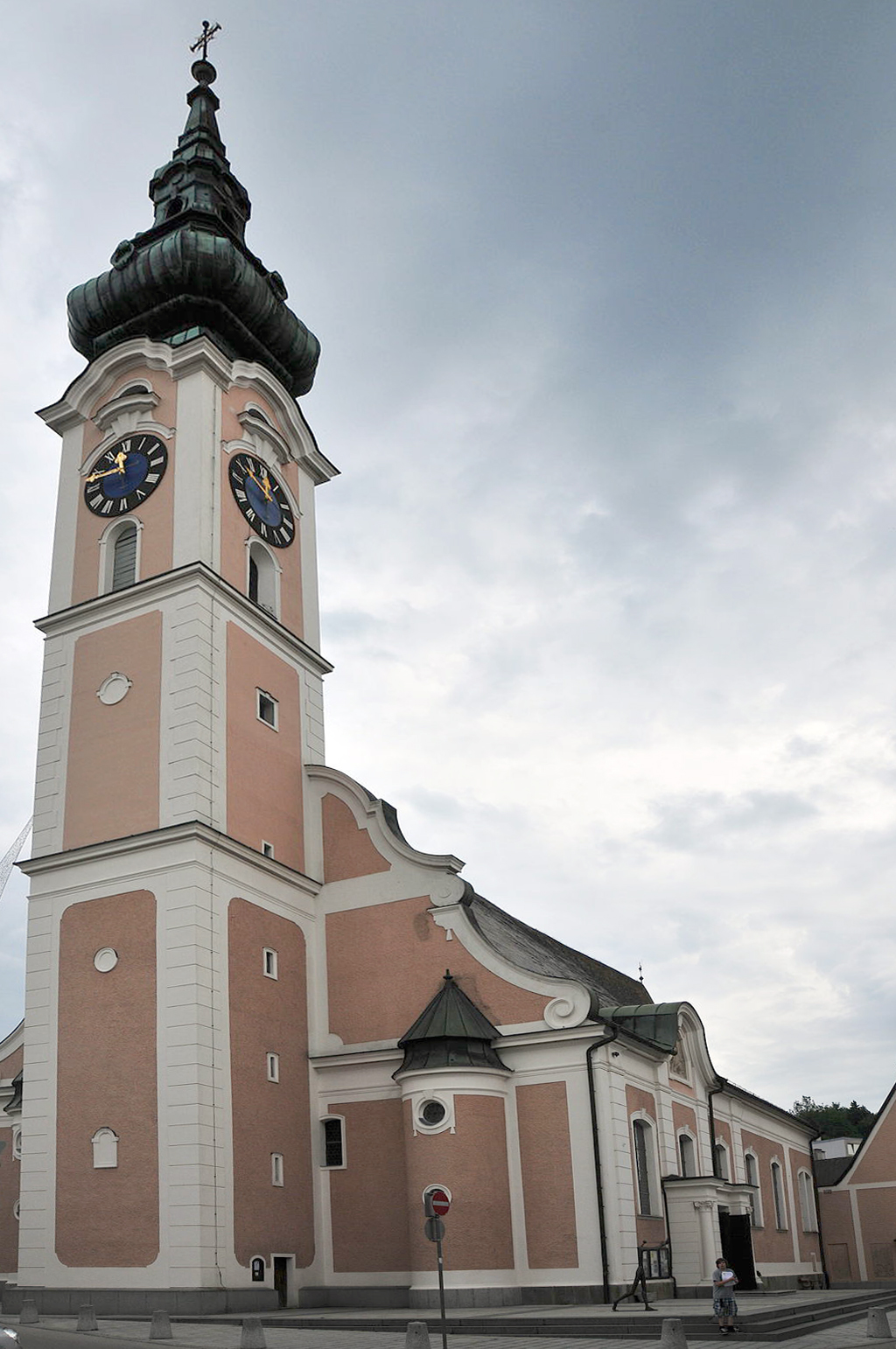 Kath. Pfarrkirche hl. Martin in Grieskirchen in Oberösterreich